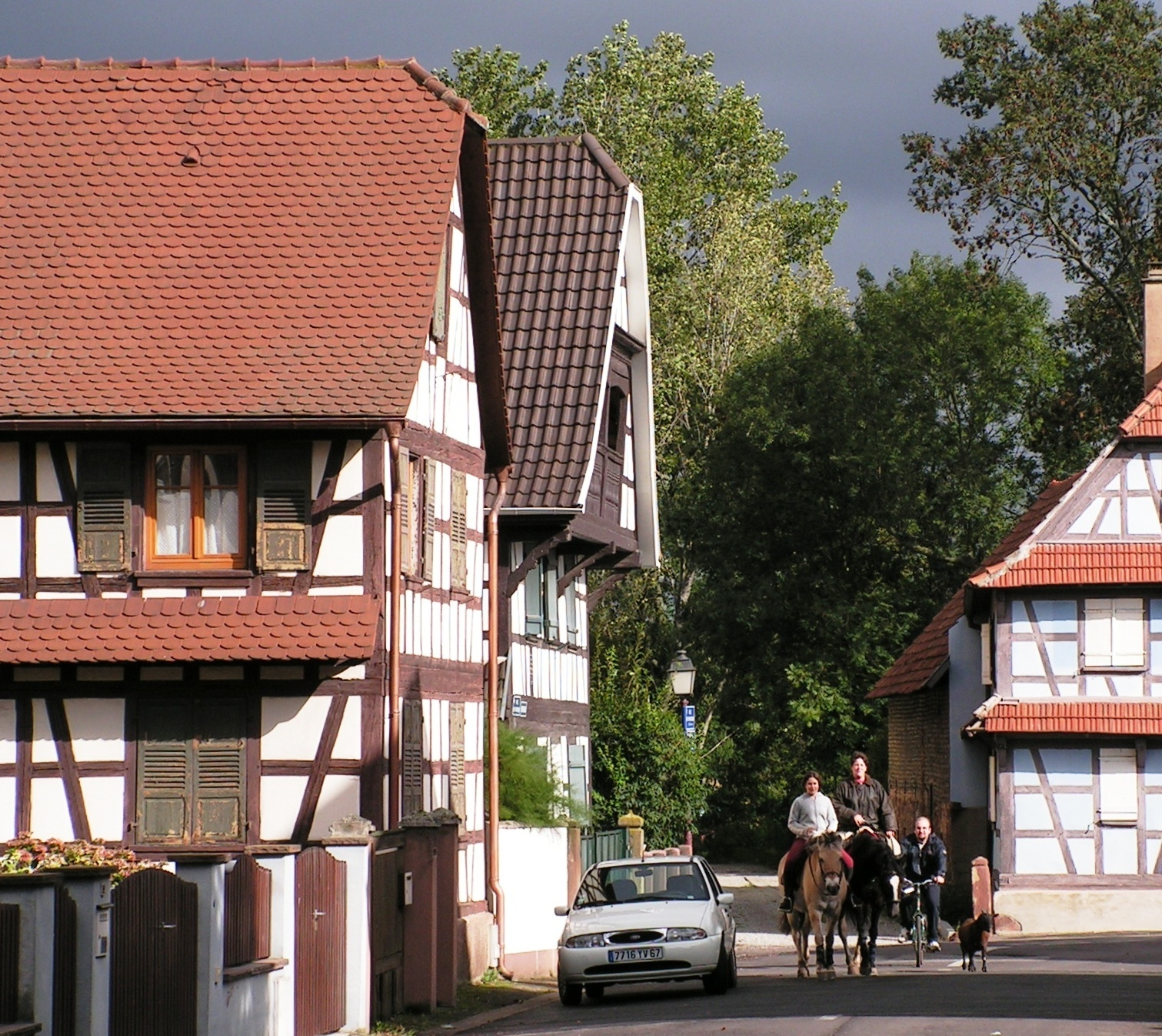 Le vieux village